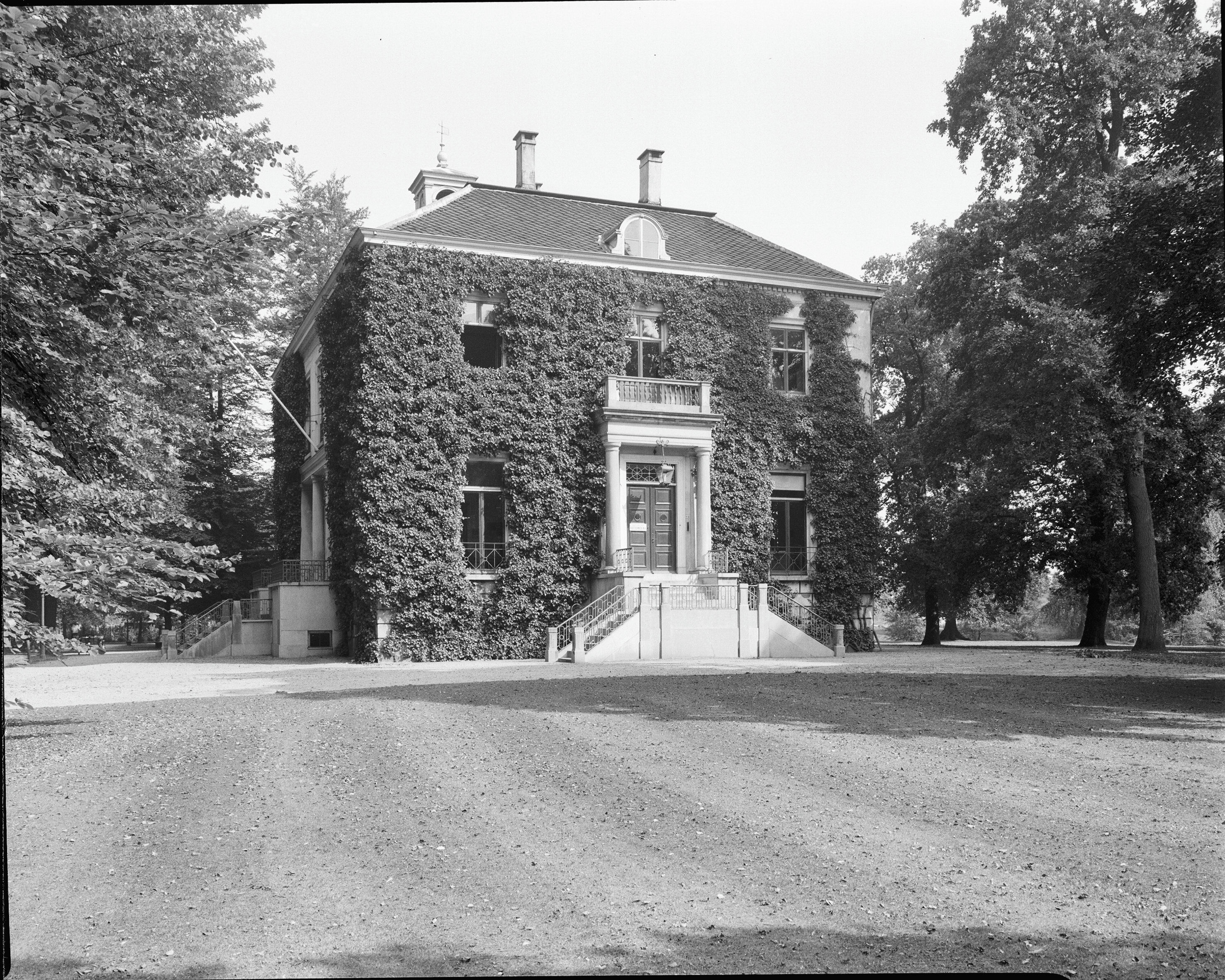 Marialust: zijgevel